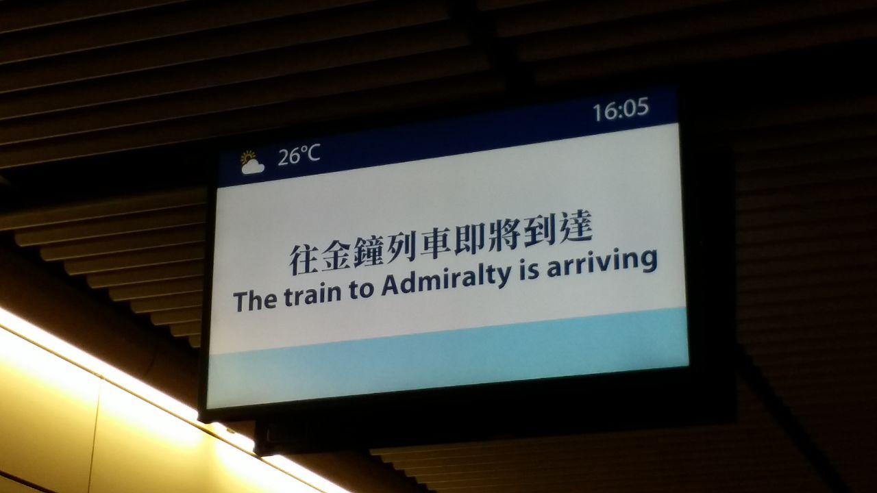 中文（香港）: 港鐵中環站列車相撞事故期間，荃灣綫南行列車改以金鐘為終點站。